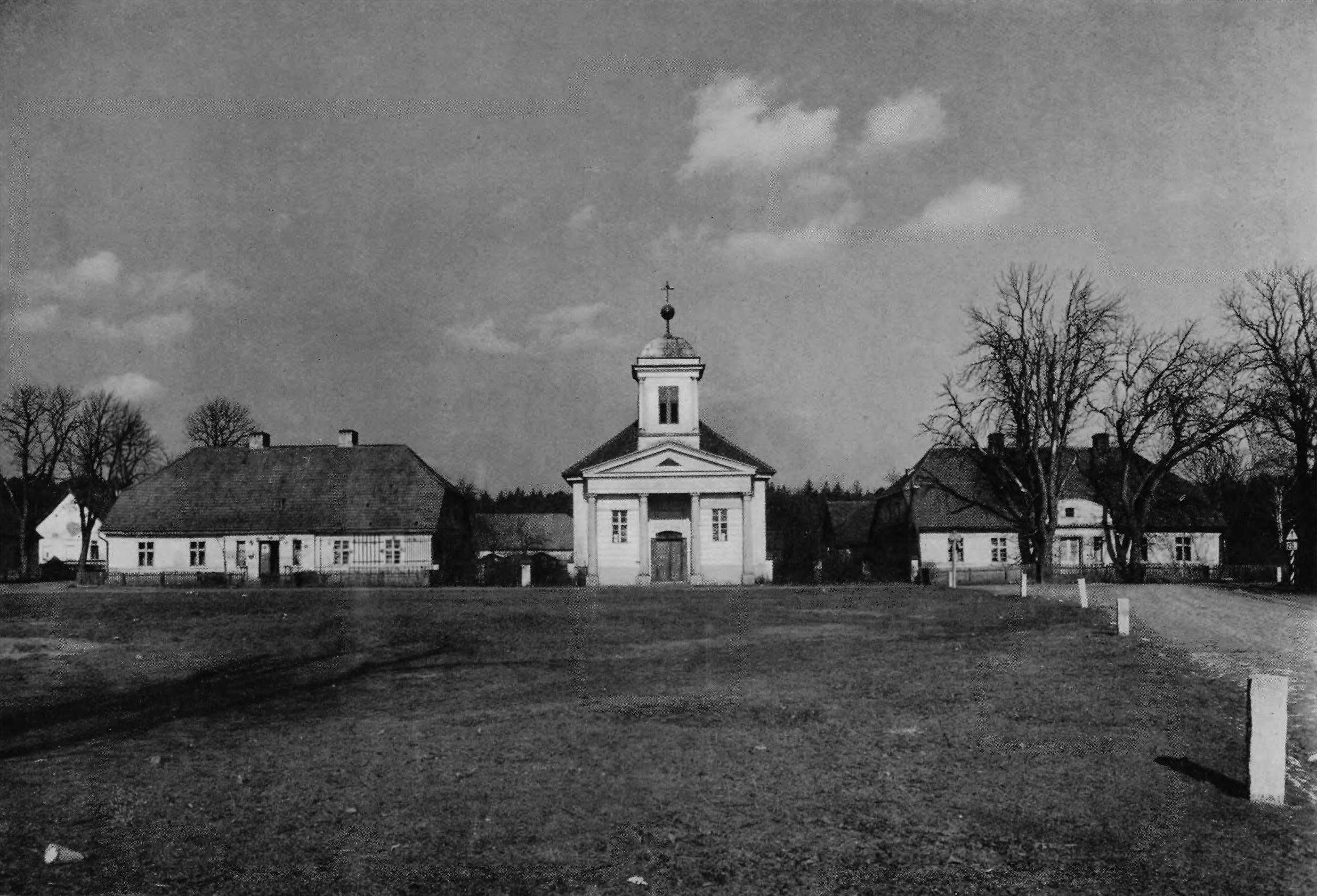 Nordseite des Hüttenplatzes mit Kirche in Jakobswalde in Oberschlesien.